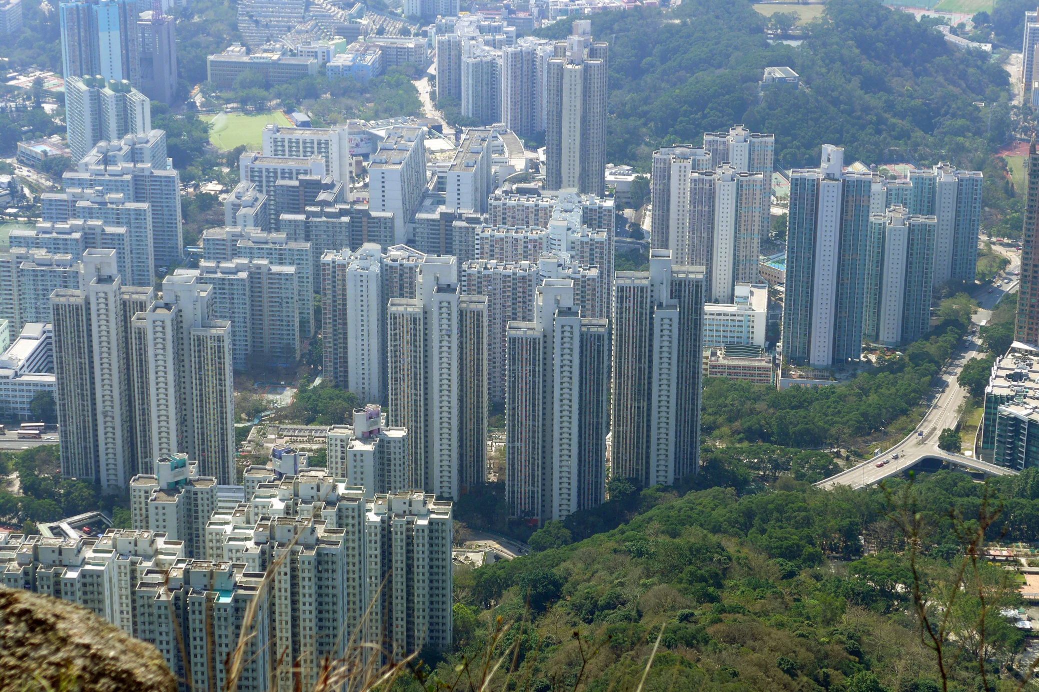 Wang Tau Hom